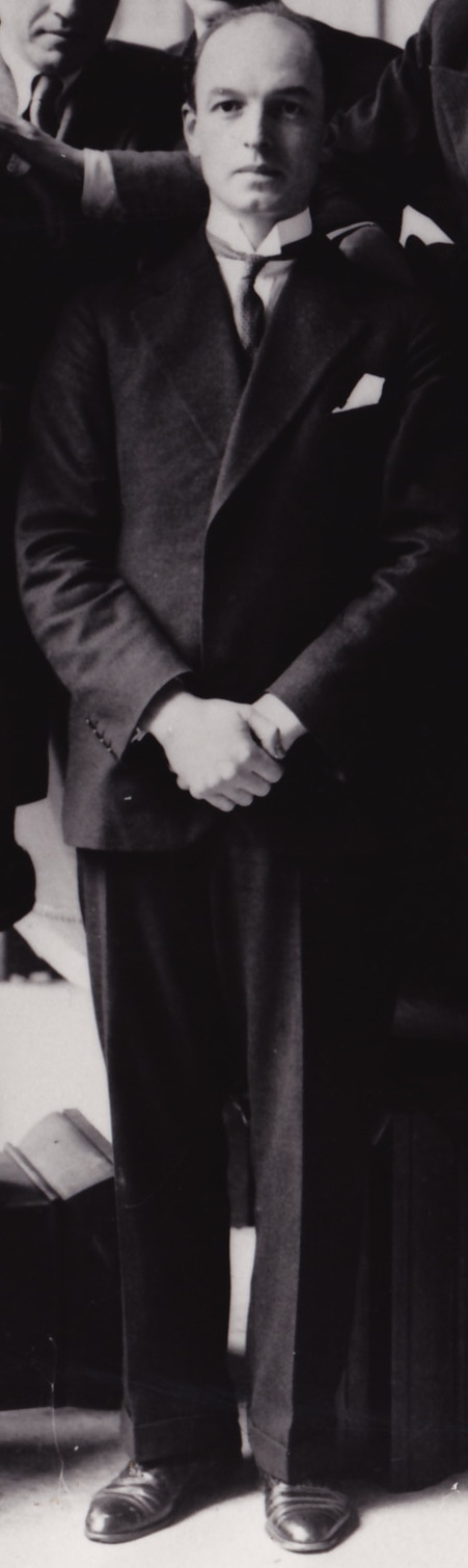 Membres de la Mission Dakar-Djibouti au Musée d'ethnographie du Trocadéro. De gauche à droite : André Schaeffner, Jean Mouchet, Georges Henri Rivière, Michel Leiris, le baron Outomsky, Marcel Griaule, Éric Lutten, Jean Moufle, Gaston-Louis Roux, Marcel Larget